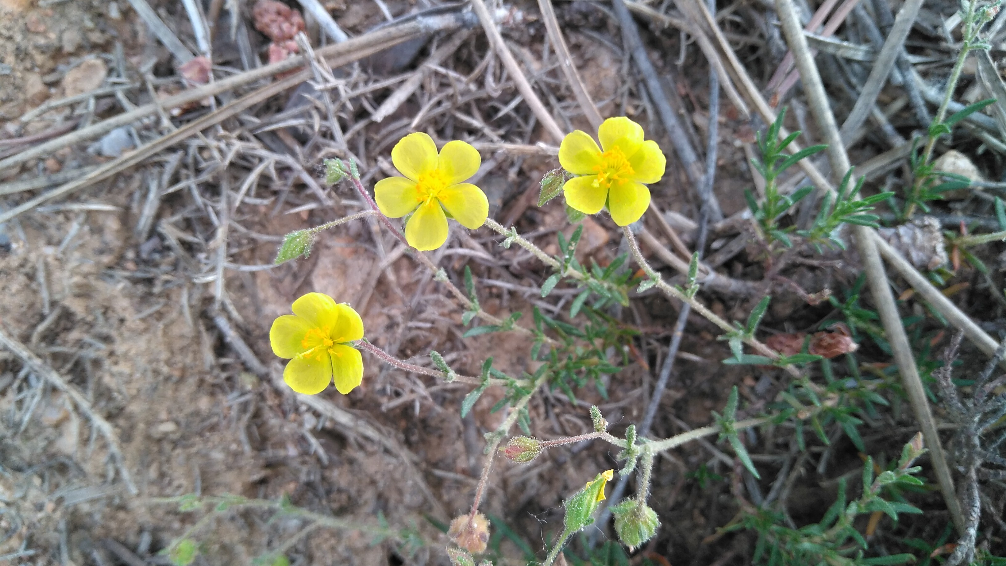 Fumana thymifolia, Santa Coloma de Farners (Catalunya)